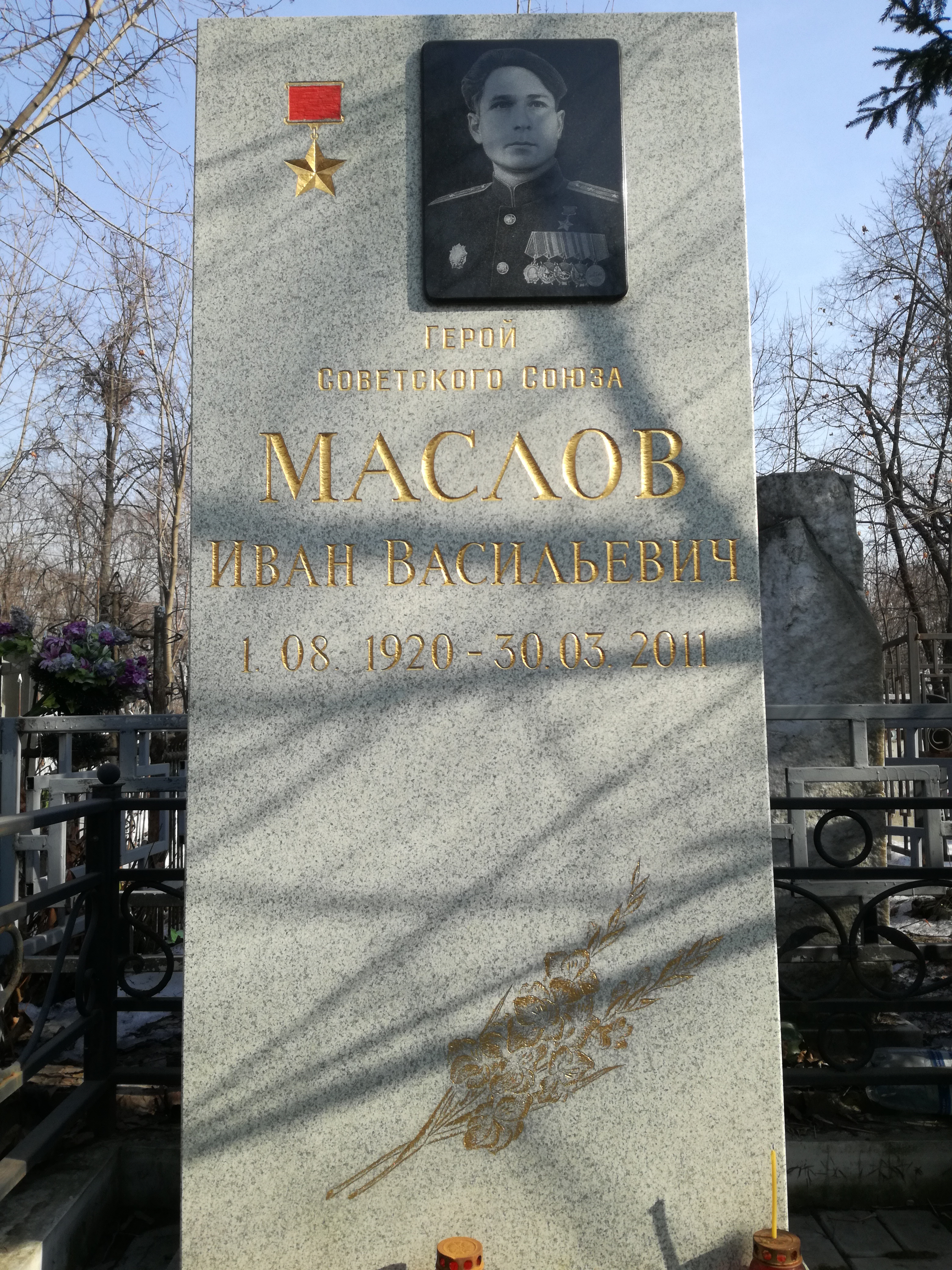 Даниловское кладбище